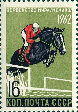 Серия «Первенства мира по летним видам спорта»: Пятиборье (Мехико).